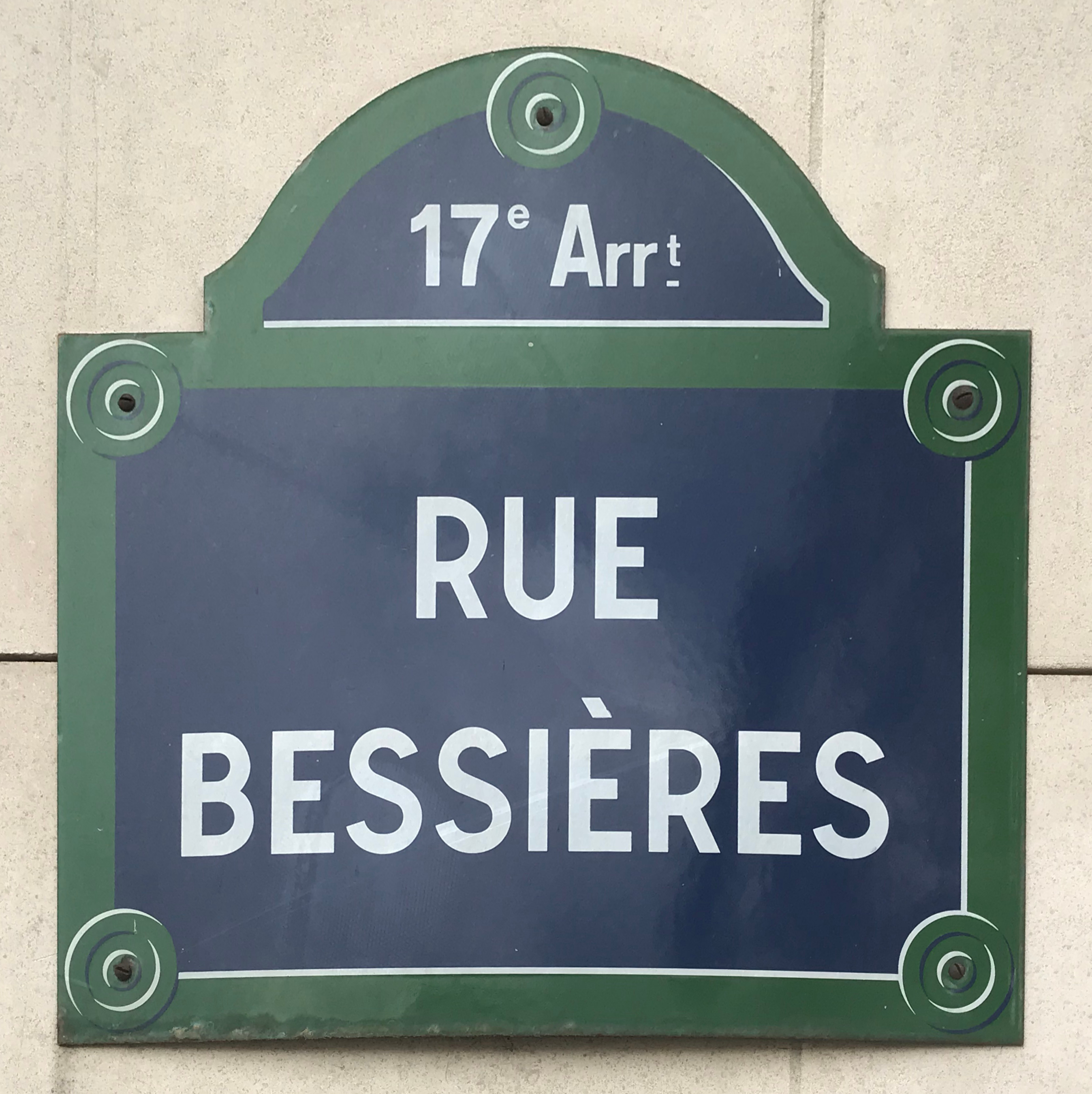 Rue Bessières (Paris)